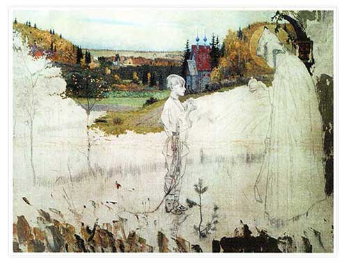 Видение отроку Варфоломею. 1989. Холст. Масло, уголь. Нестеровский музей